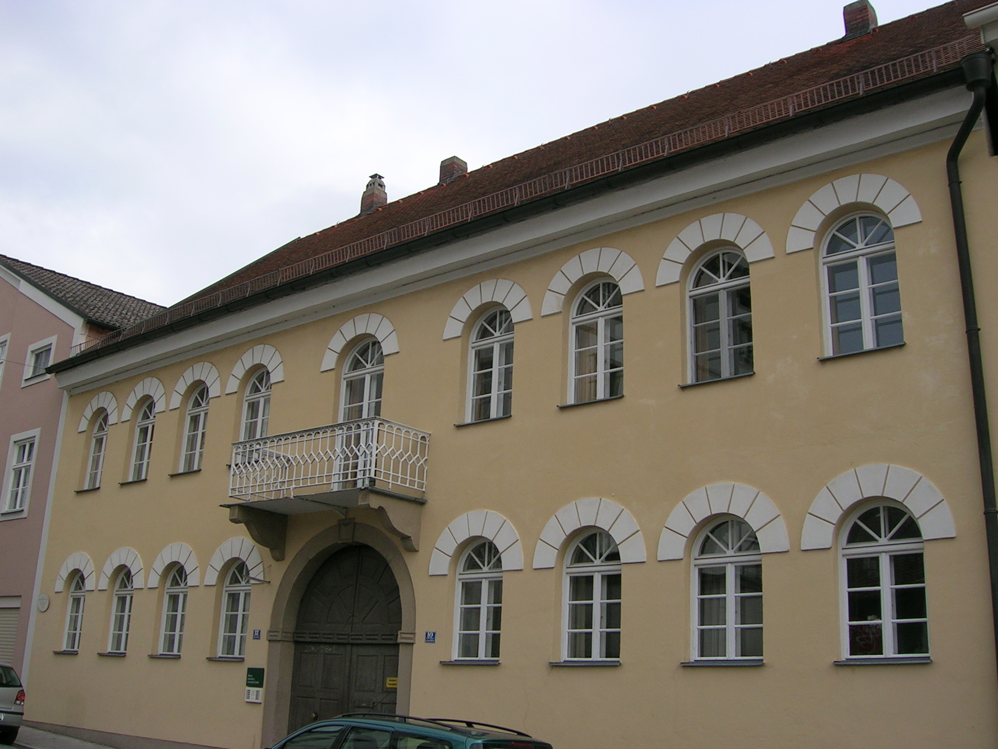 Ehem. Domherrenhof Andlau, klassizistischer Traufseitbau, 1830/40; ursprüngliches Hauptgebäude im Hof, Giebelbau, bez. 1525, auf mittelalterlichem Kern, Umgestaltung 18. Jh.; Nebengebäude, wohl 18. Jh.; Teile der mittelalterlichen Stadtmauer mit Wehrturm, an den Garten angrenzend.